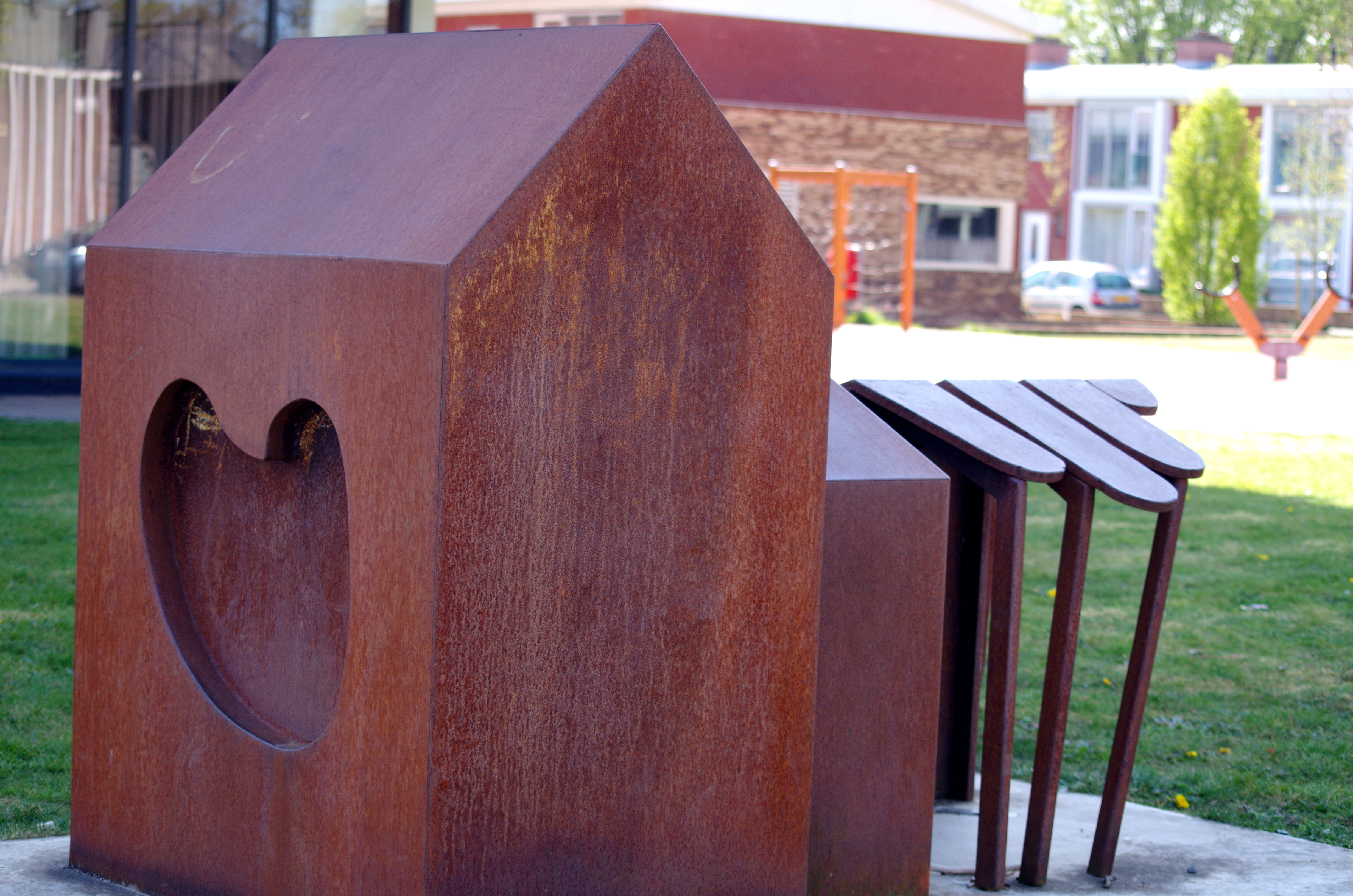 Mooi zo voor mekaar Ton Duivenvoorden (2012)